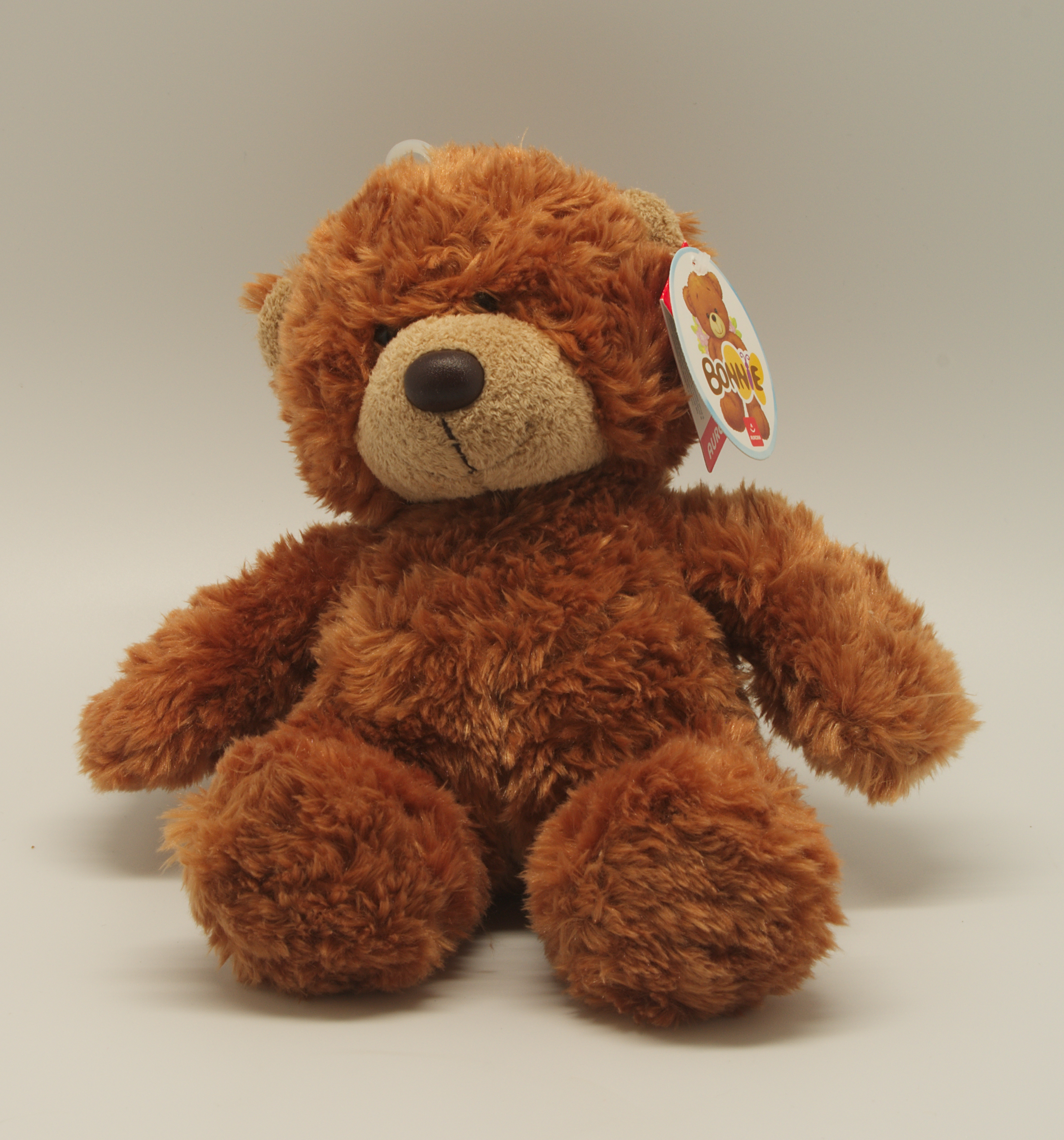 Ours en peluche